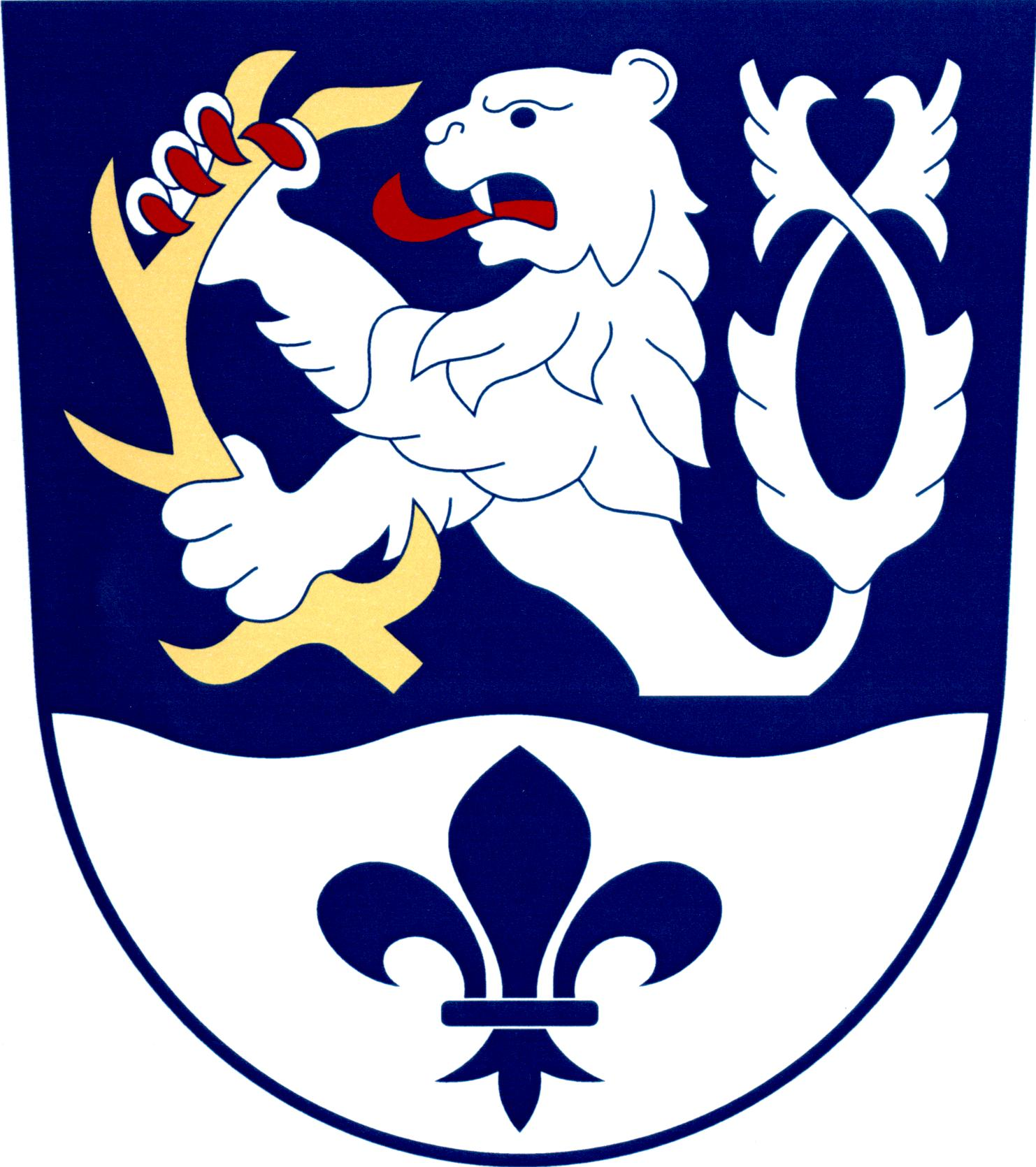 Znak obce Nová Ves (okres Mělník)